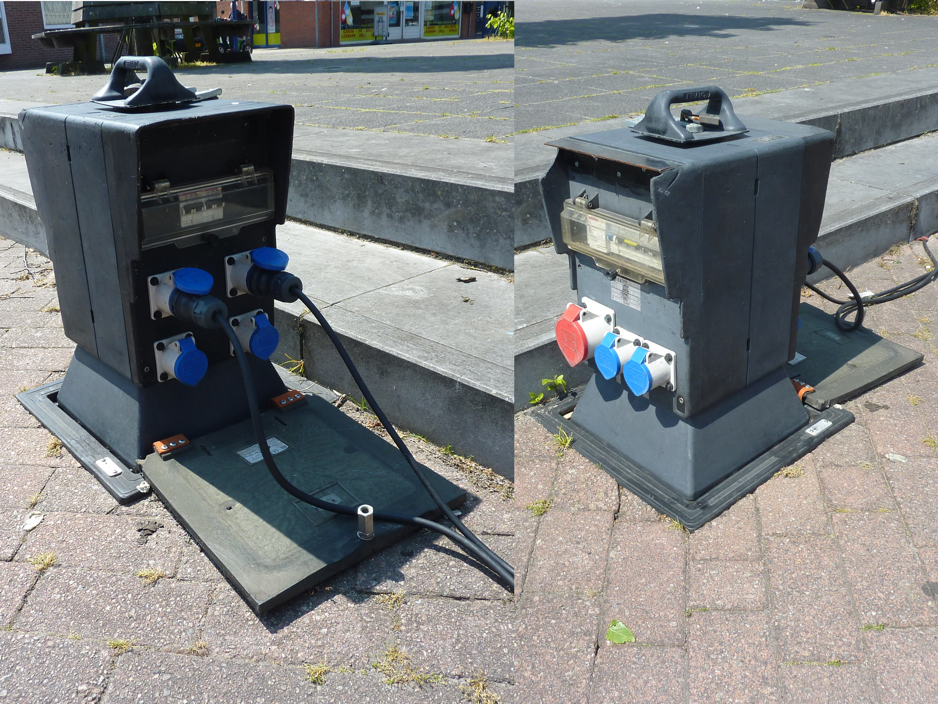 Stromverteiler für Kioske, Verkaufswagen und Stände auf einem Marktplatz in Delfzijl